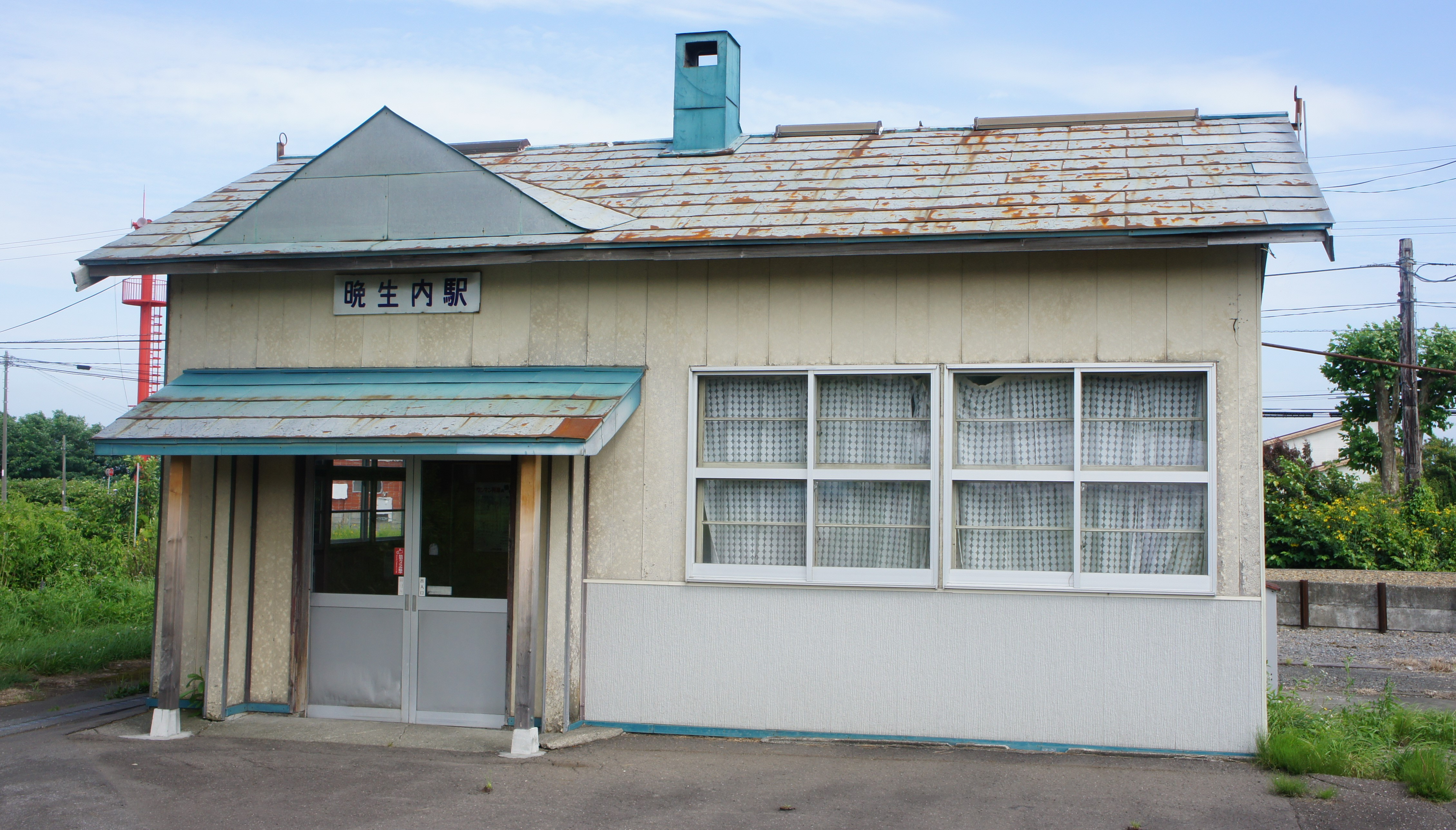 JR札沼線・晩生内駅の駅舎